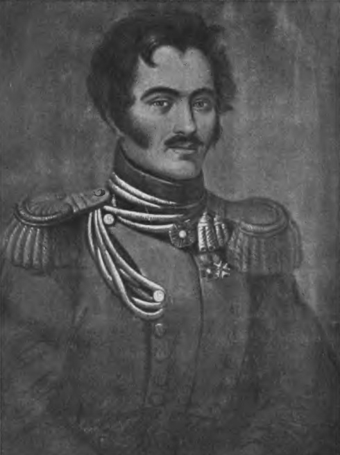 Portret Karola hr. Przeździeckiego